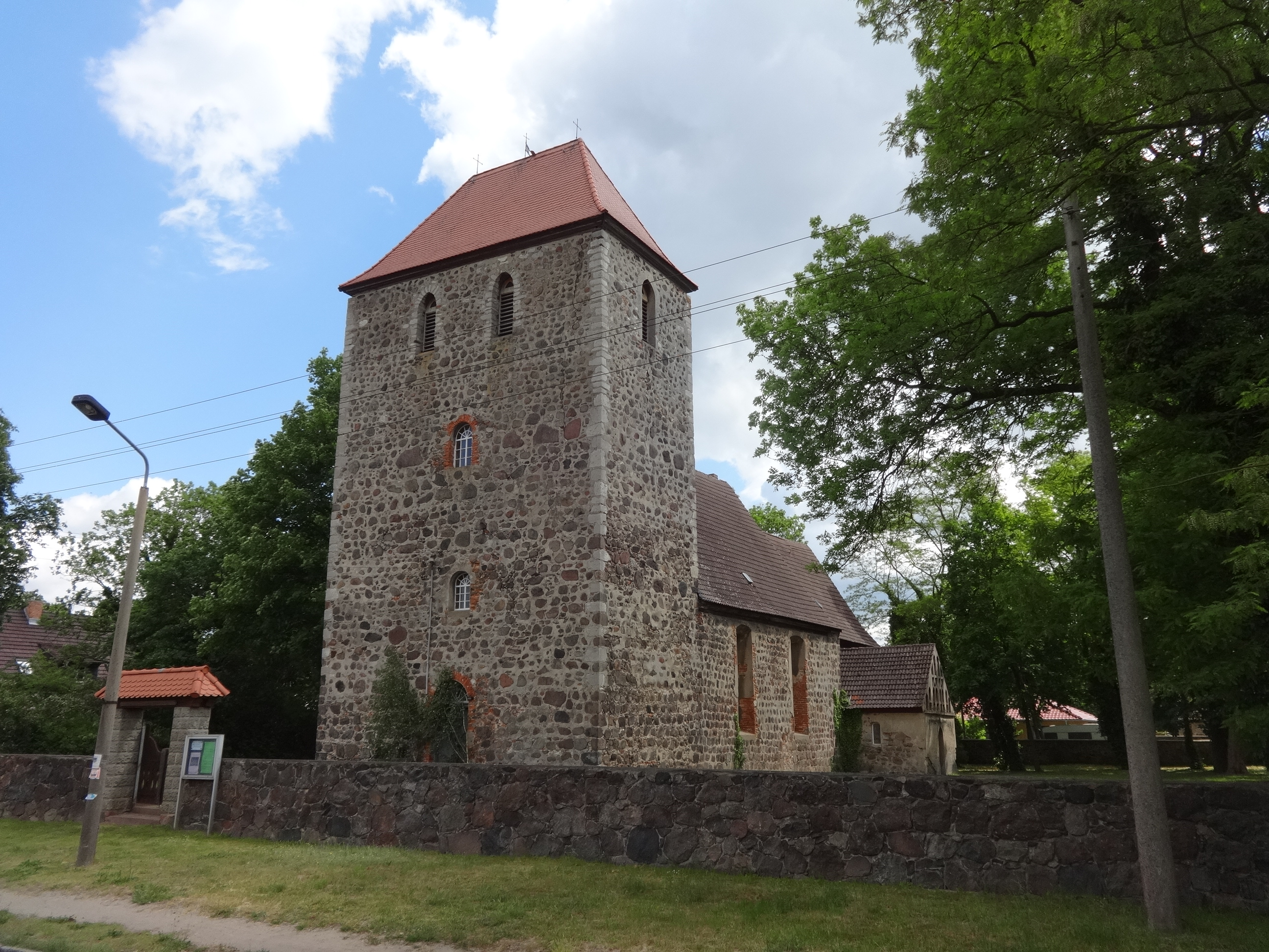 Die Kirche Rehfelde ist eine Chorquadratkirche, die in der zweiten Hälfte des 13. Jahrhunderts als regelmäßig geschichteten Feldsteinen errichtet wurde. Der Turm entstand zu einem späteren Zeitpunkt. In der flach gedeckten Kirche befinden sich eine Kanzel, ein Altar sowie eine Orgelempore aus dem Jahr 1722 sowie eine pokalförmige Fünte aus Rüdersdorfer Kalkstein